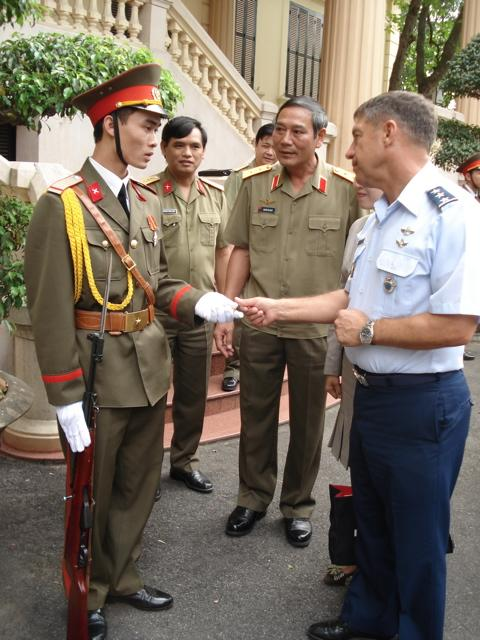 VIETNAM -- Lieutenant General Dan Leaf, Deputy Commander U.S. Pacific Command, presents a coin to a People’s Army of Vietnam (PAVN) soldier, May 3, 2007. Lieutenant General Leaf was recently in Vietnam to identify possible future military engagement activities